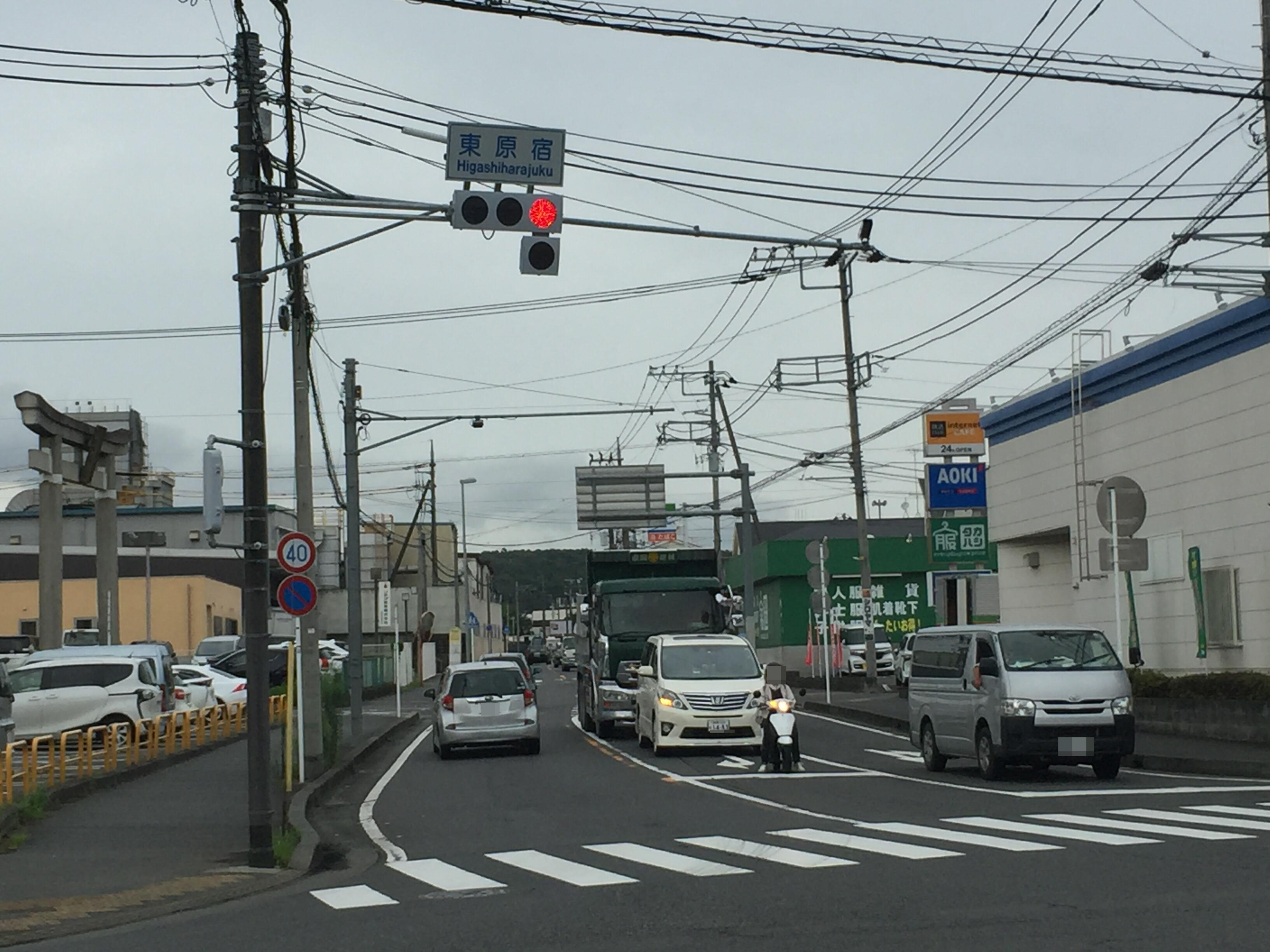 東原宿交差点（相模原市緑区原宿）。県道506号線・めじろ台方面起点。